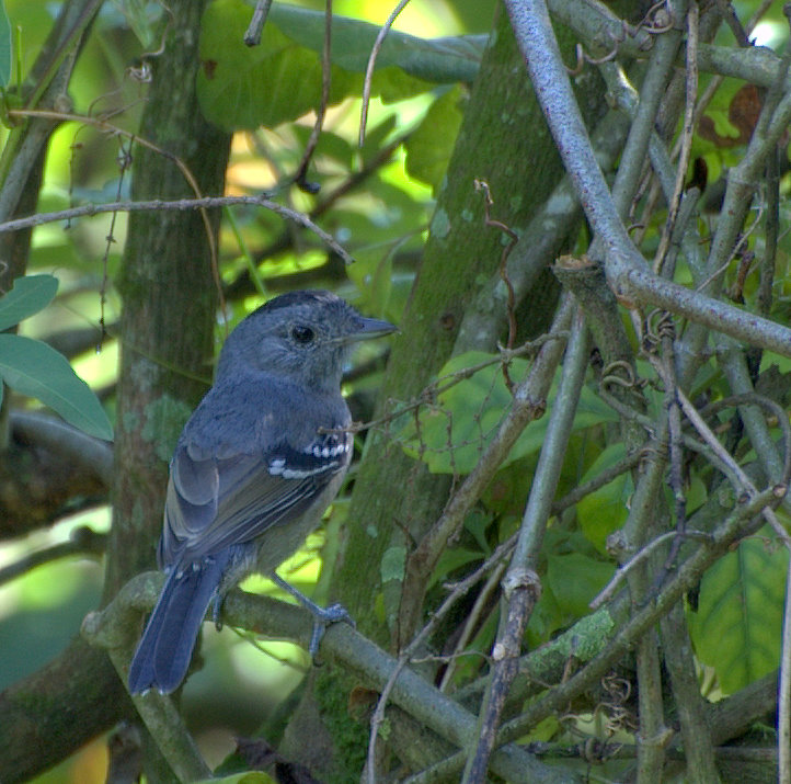 Thamnophilus caerulescens at Horto Florestal de São Paulo